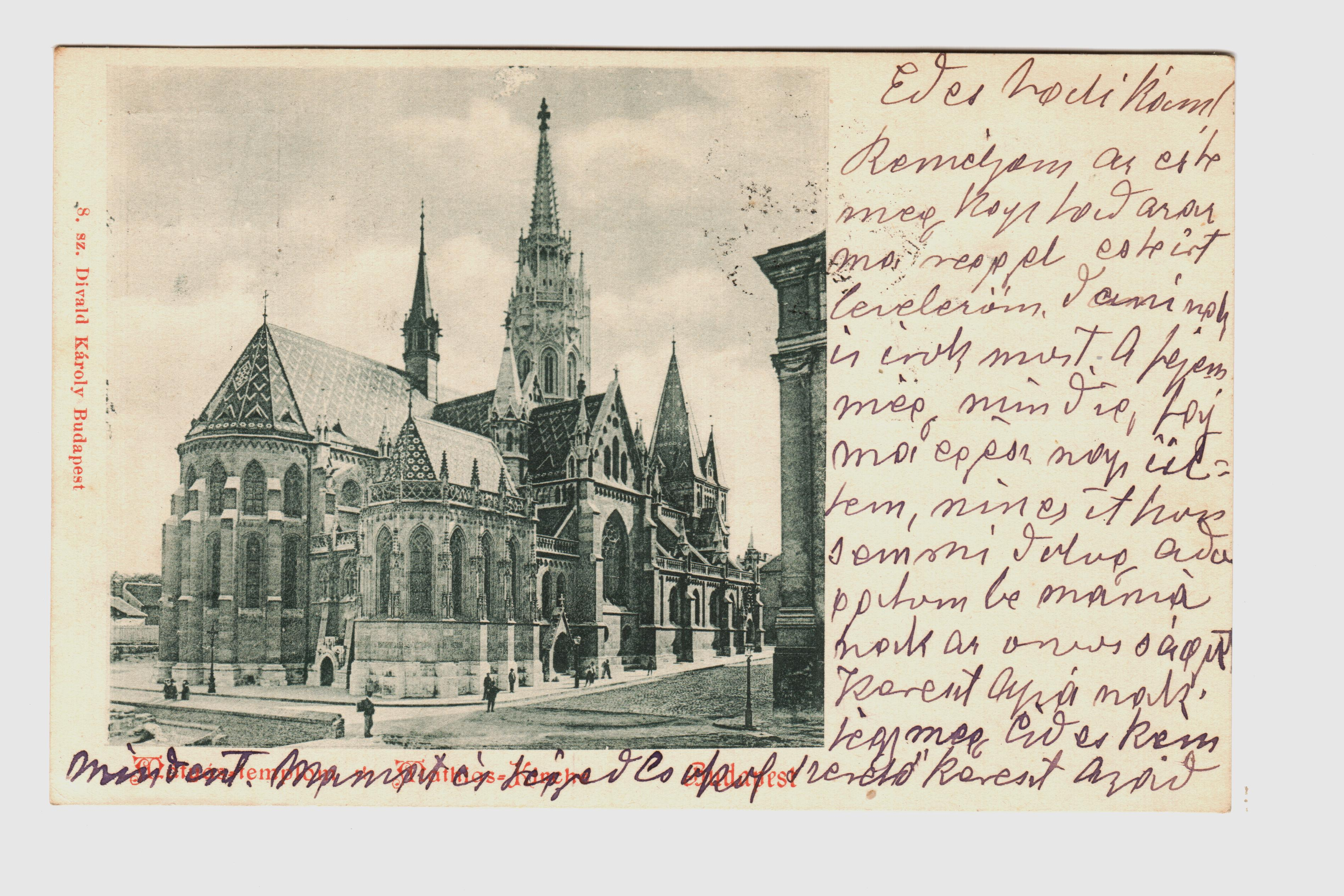 A Mátyás-templom a 19. század végén (Budapest)